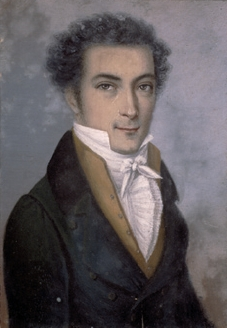 Xaver Franz Milz (1765-1833): Portrait von Ludwig von Zanth